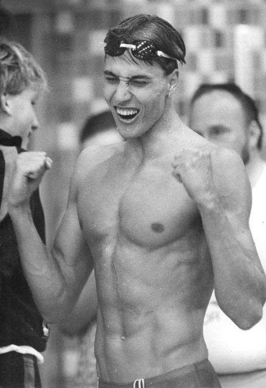 Jens-Peter Berndt ADN-ZB Kluge 24.5.84 Magdeburg: 35. DDR-Schwimm-Meisterschaften- Freude über den Weltrekord bei Jens-Peter Berndt. Der Potsdamer ASK-Schwimmer erreichte am zweiten Tag der titelkämpfe (23.5.) über 400 m Lagen 4:19,81 min und blieb damit um 0,17 s unter der alten Weltrekordmarke des Brasilianers Prado. Abgebildete Personen: Berndt, Jens Peter: Schwimmer, DDR